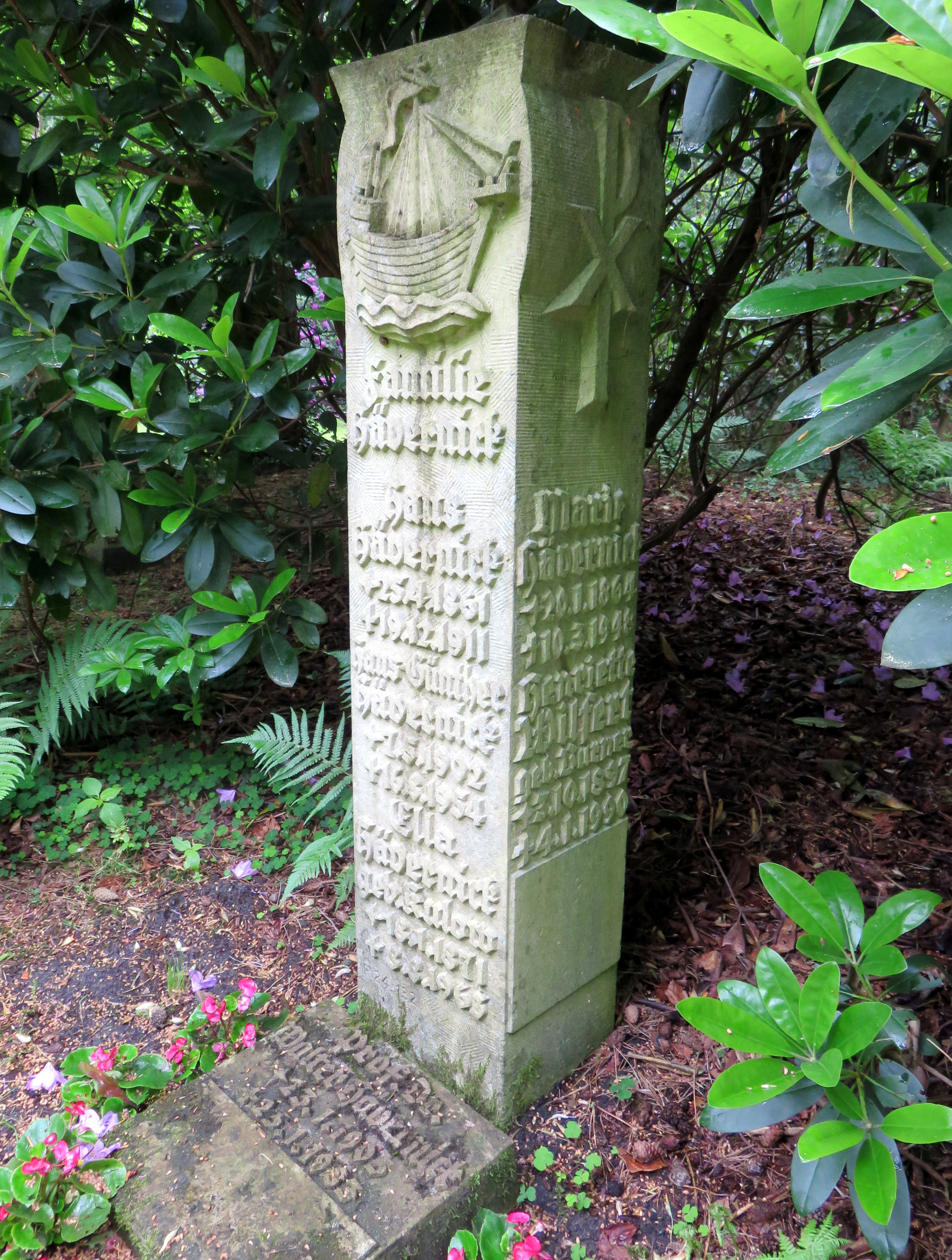 Grab des deutschen Numismatikers und Volkskundlers Walter Hävernick, (1946-1973) Direktor des Museums für Hamburgische Geschichte. Grablage auf dem Hamburger Friedhof Ohlsdorf: R24,132 (östlich Waldstraße/nördlich Wasserturm).